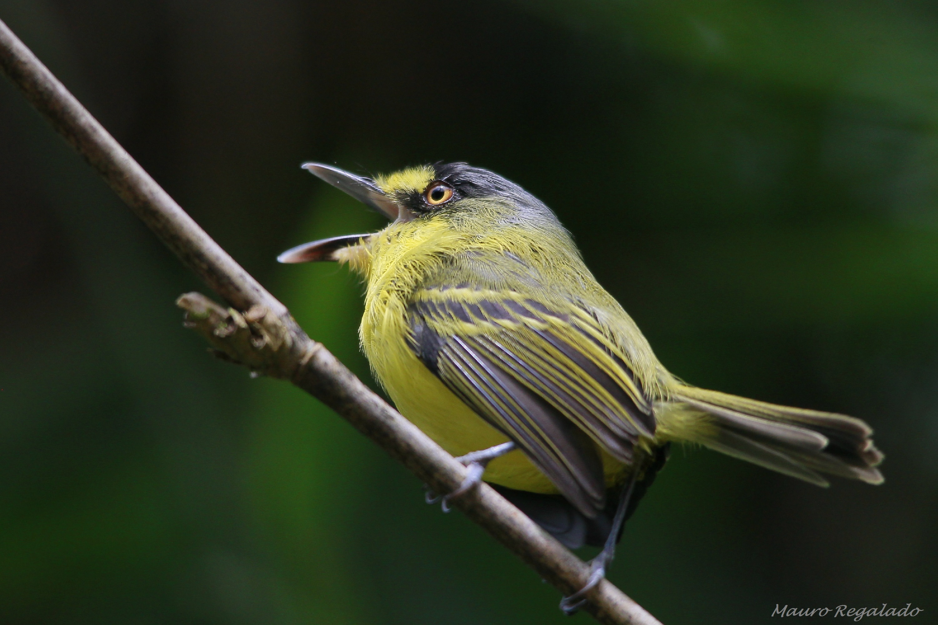 Teque-teque Todirostrum poliocephalum (animal - cordado - tetrapoda - Aves)